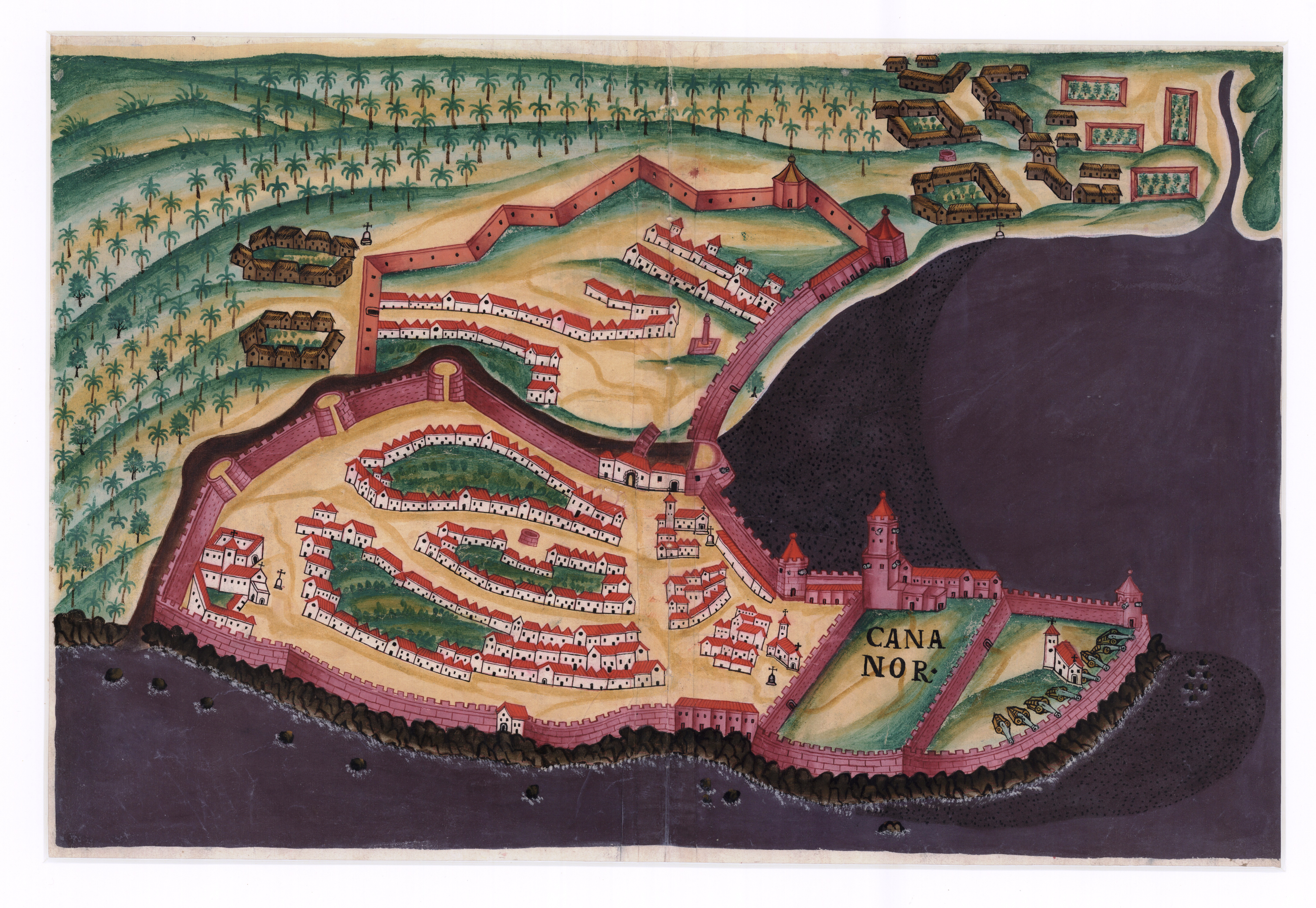 Planta da Fortaleza de Cananor in BOCARRO, António. Livro das Plantas de todas as fortalezas, cidades e povoaçoens do Estado da Índia Oriental. 1635.